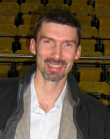 Dariusz Parzeński